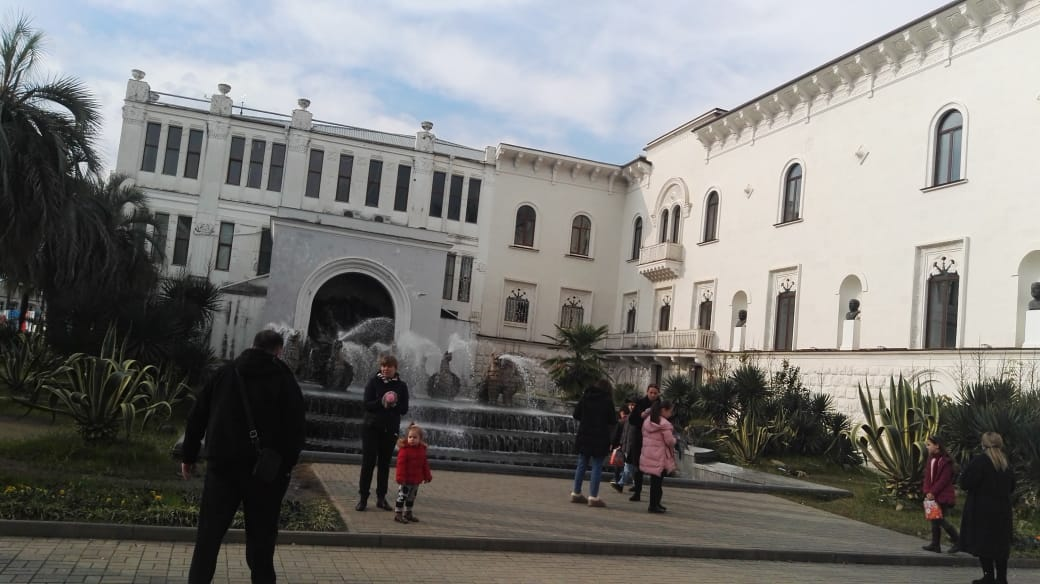 Абхазский государственный драматический театр